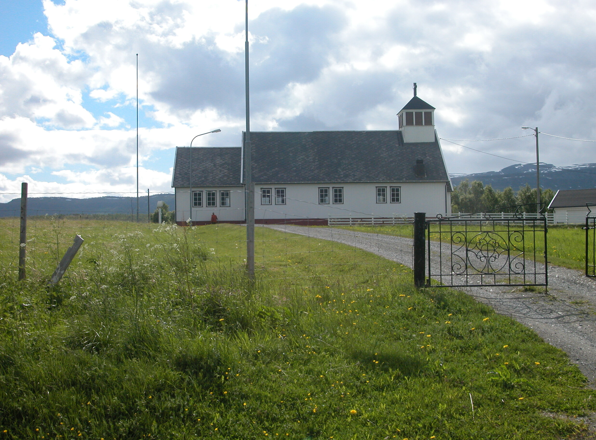 Sekkemo kirke. Foto: Iver Schonhowd. Fra Riksantikvarens Kulturminnesøk.